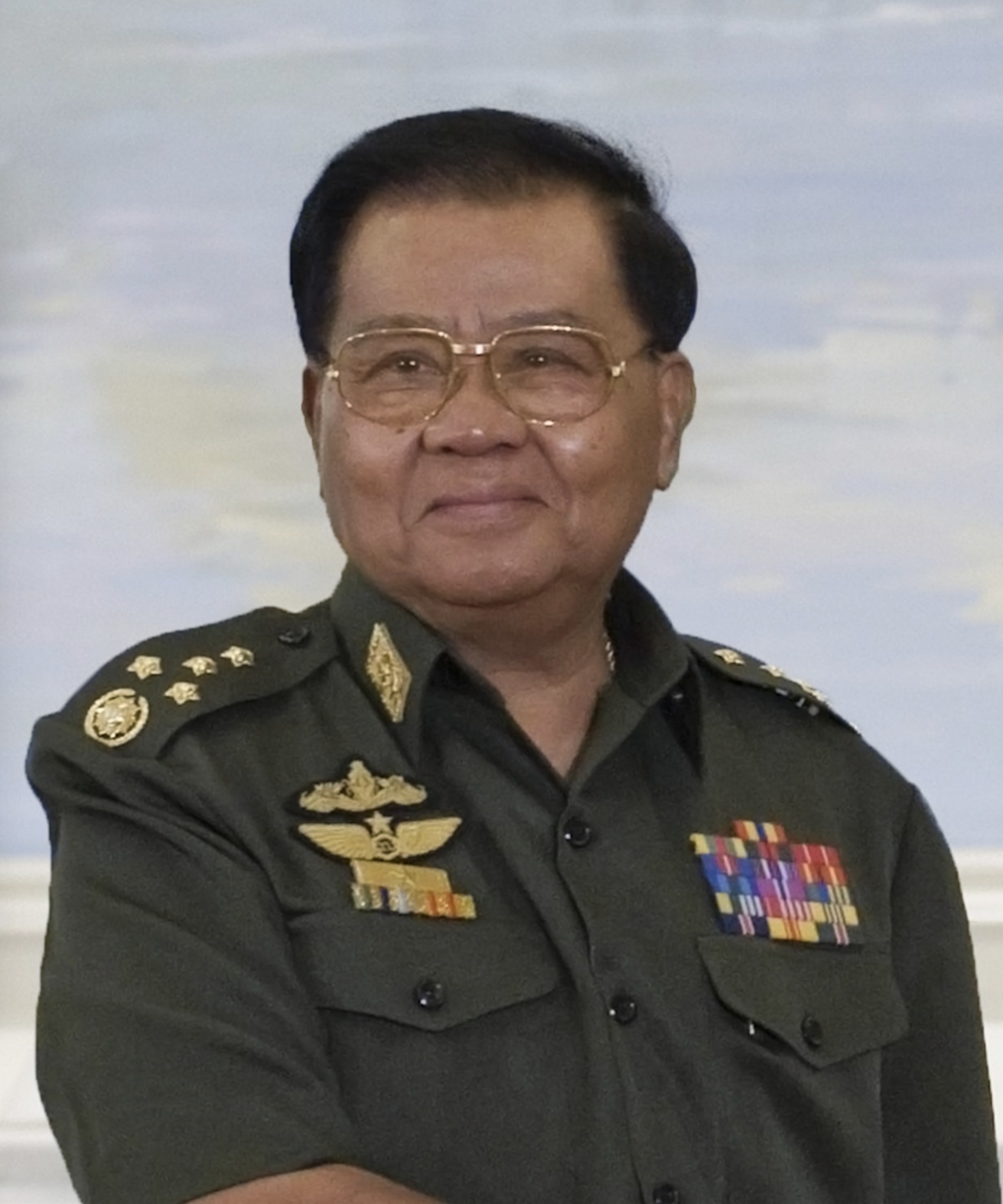 นายกรัฐมนตรีเยี่ยมคารวะพลเอกอาวุโส ตาน ฉ่วย ประธานสภาสันติภาพและการพัฒนาแห่งรัฐ (State Peace and Development Council of the Union of Myanmar - SPDC) ณ เรือนรับรอง Zeyarthiri Beikman นครเนปิดอว์ สหภาพพม่า วันจันทร์ ที่ 11 ตุลาคม พ.ศ.2553 (Photographer attached to the Prime Minister of the Kingdom of Thailand : Peerapat Wimolrungkarat / พีรพัฒน์ วิมลรังครัตน์)